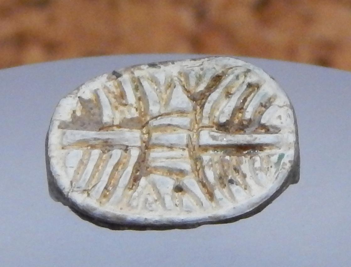 Scaraboide (Tomba n. 25 Monti Prama)